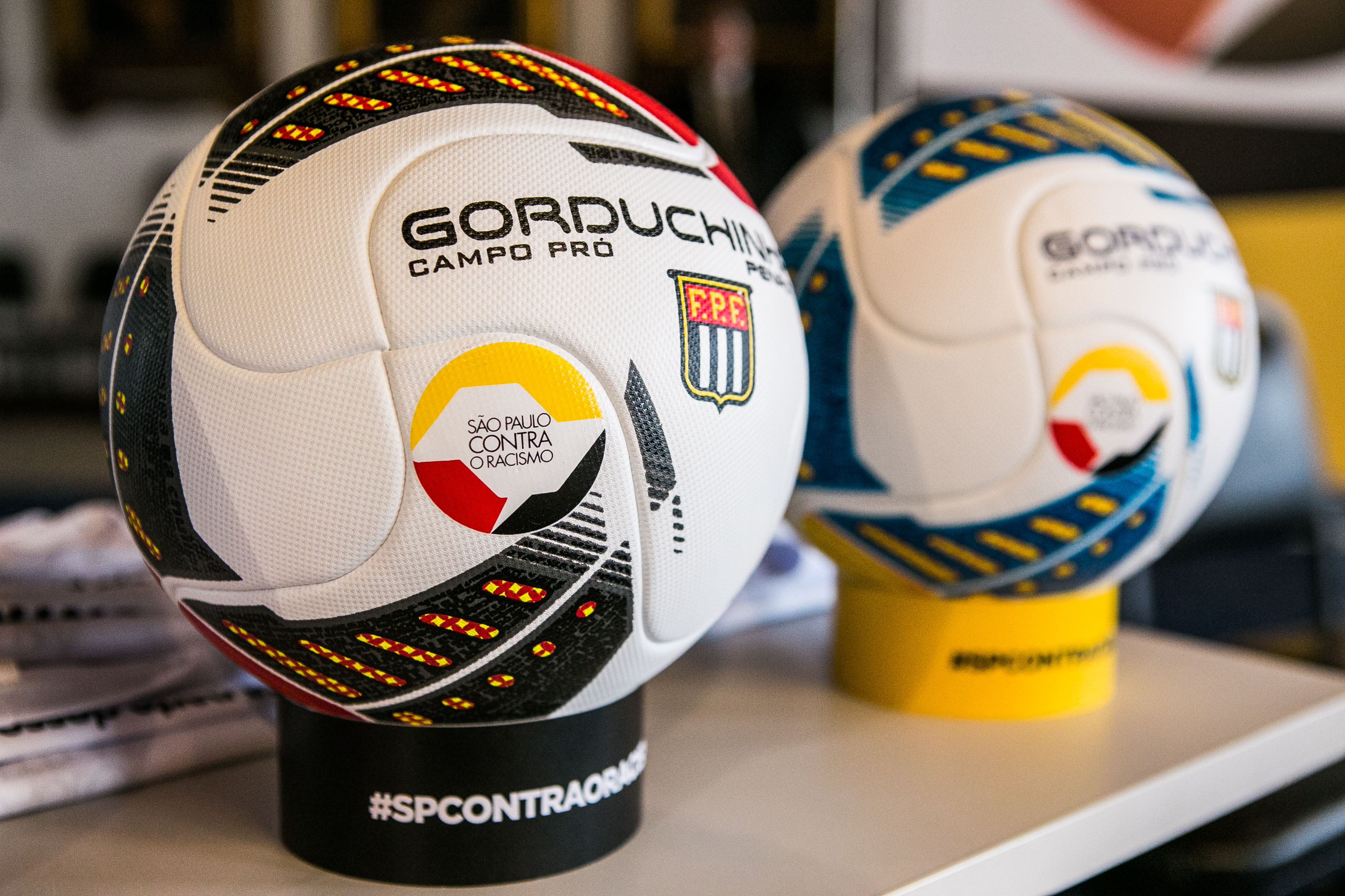 O governador Geraldo Alckmin durante evento com jogadores e dirigentes dos times de futebol semifinalistas do Campeonato Paulista. Jogadores do Corinthians, Santos, São Paulo e Palmeiras participaram do lançamento da campanha "SP Contra o Racismo", uma parceria do Governo do Estado e Federação Paulista de Futebol. Data: 16/04/2015. Local: São Paulo/SP.Foto: Edson Lopes Jr/A2Img